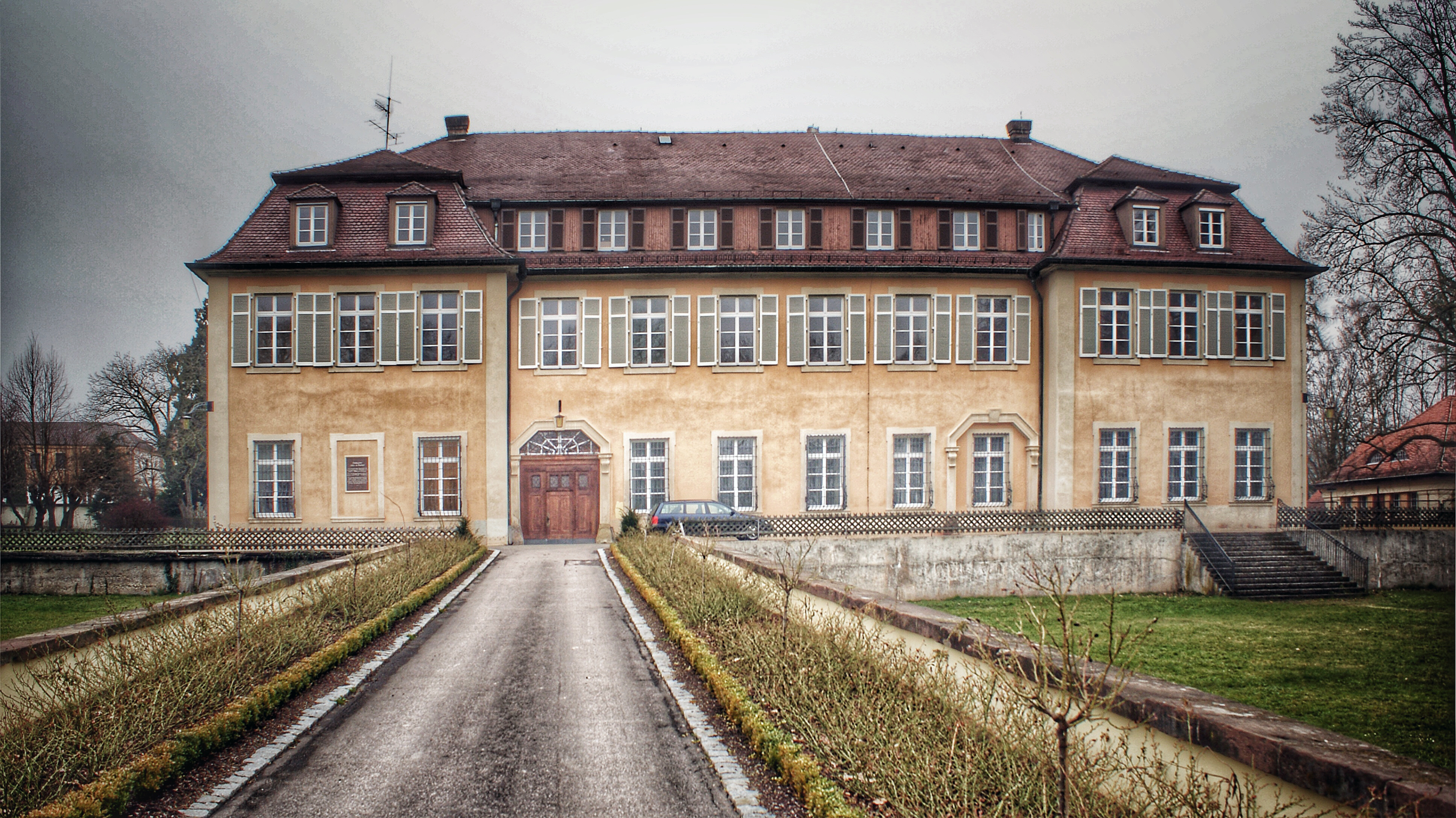 Schloss Freudental, erbaut durch Paolo Retti 1729-1731, für die Reichsgräfin Christina Wilhelmina von Würben, geborene Gräfin von Grävenitz. Ansicht der Gartenseite.